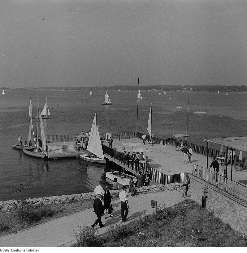 Original image description from the Deutsche Fotothek See bei Warschau (oder Masuren)Zegrze-Stausee nahe Warschau, Polen